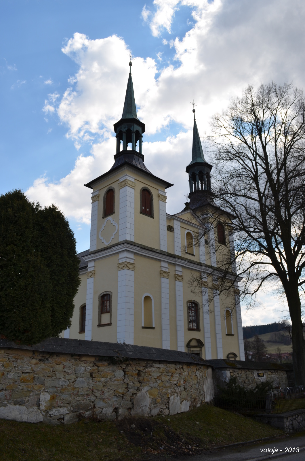 LETOHRAD - ORLICE, kostel Nanebevzetí Panny Marie